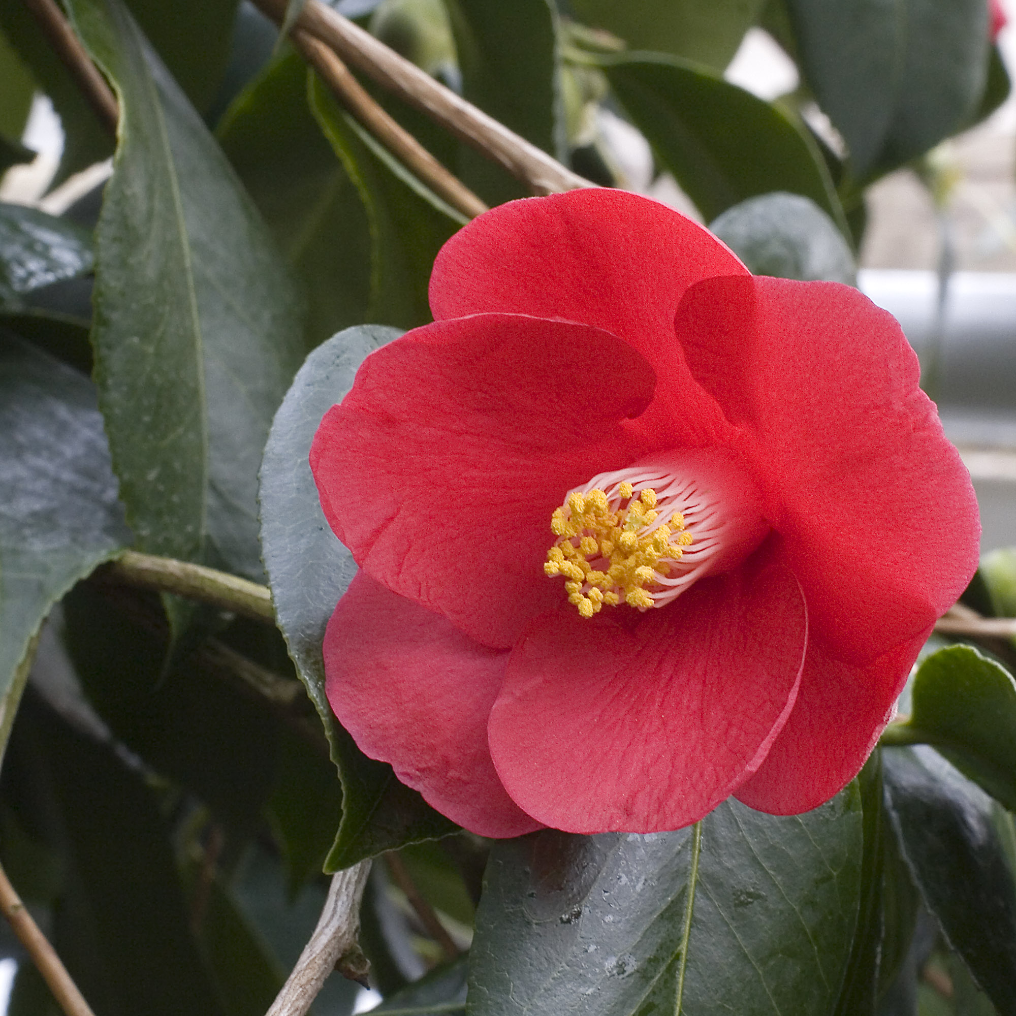 Camellia japonica, cv Ashiya. Zuschendorf near Pirna (Saxony, Germany)